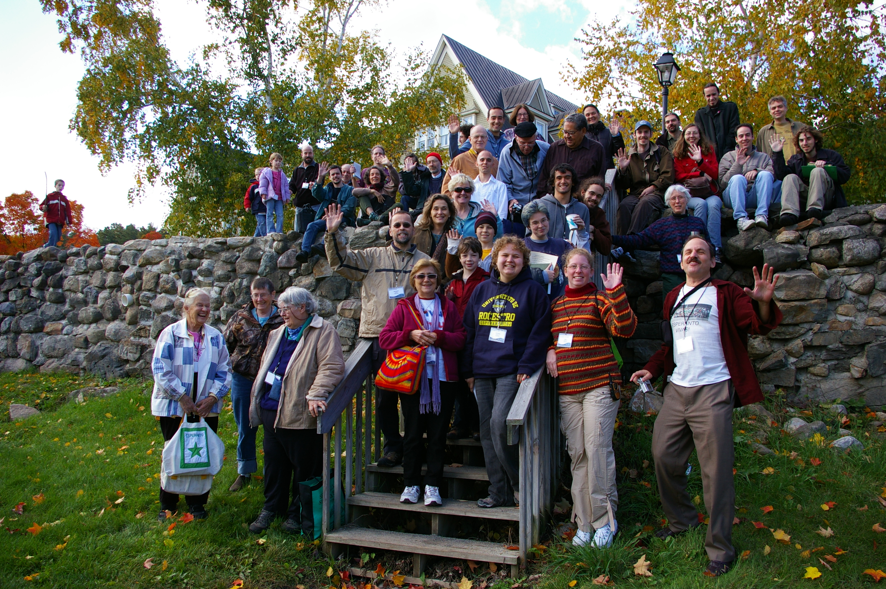 Aŭtuna Renkontiĝo de Esperanto en 2009.